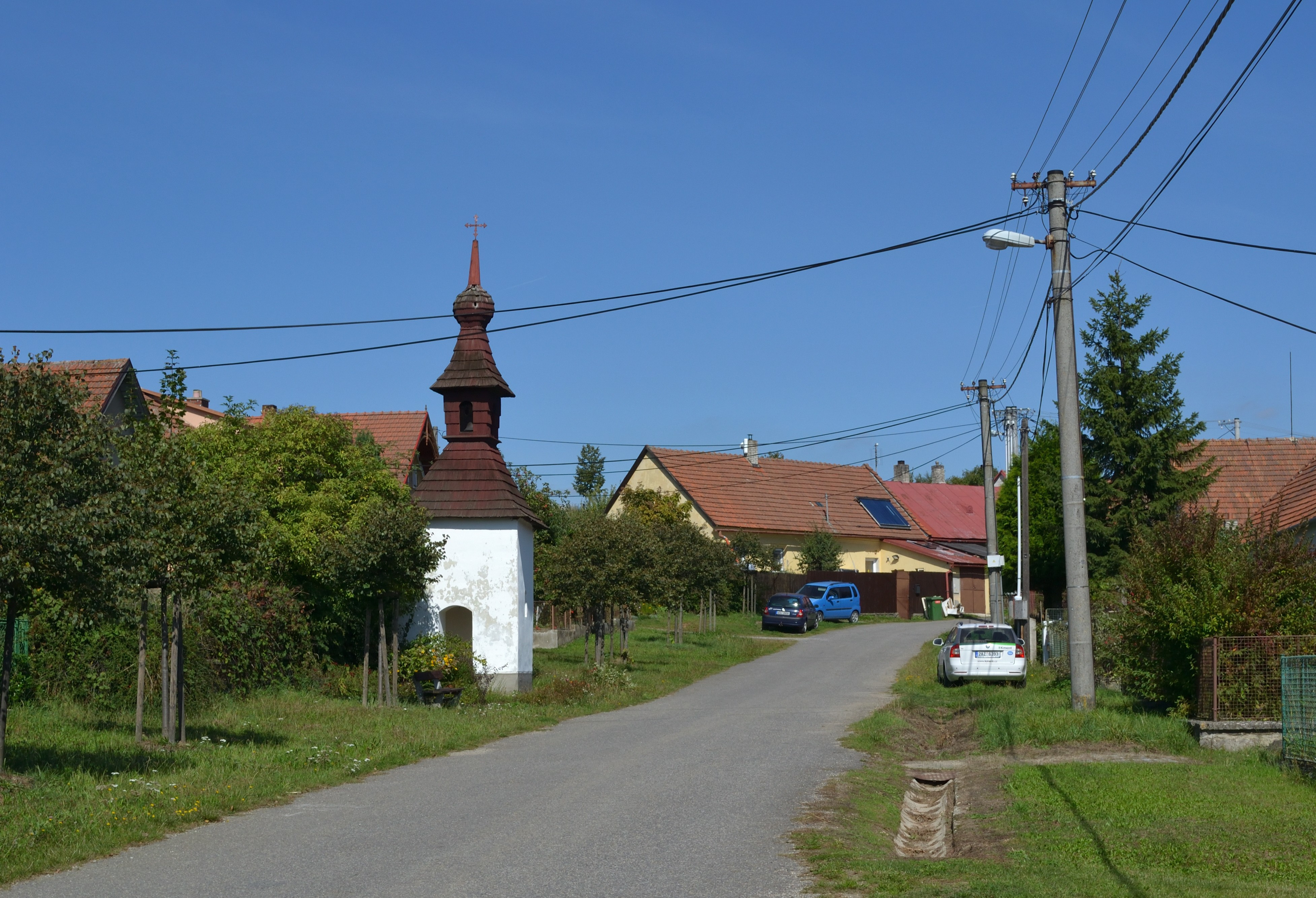 Cyrilov (Bory) - silnicová náves se zvonicí